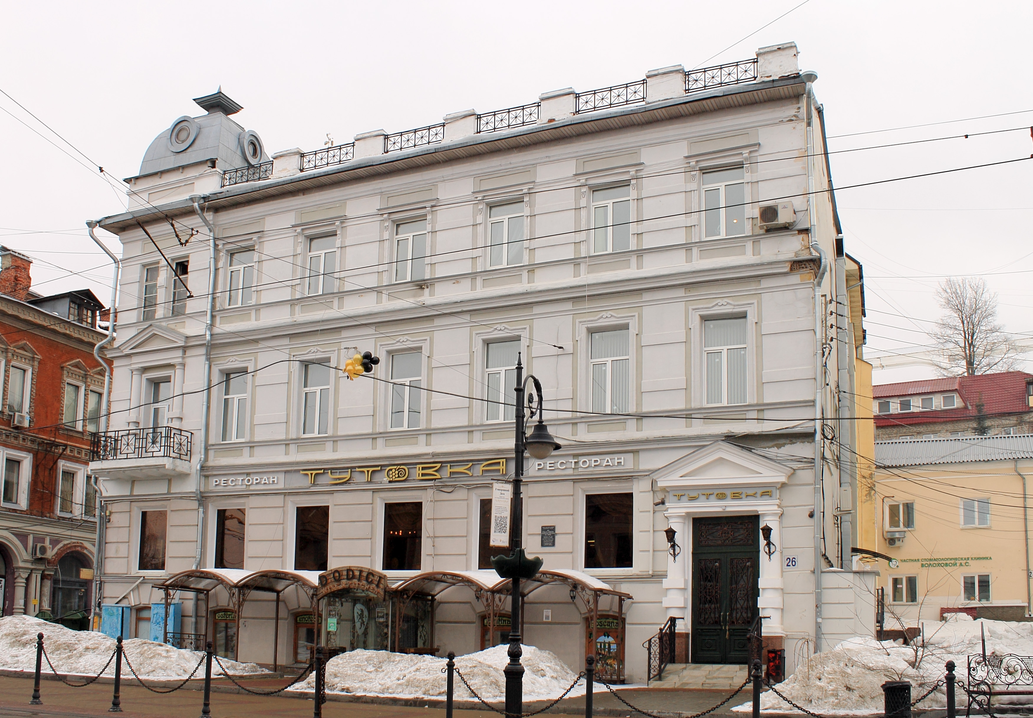 Доходный дом: улица Рождественская, 26, Нижний Новгород, Нижегородская область